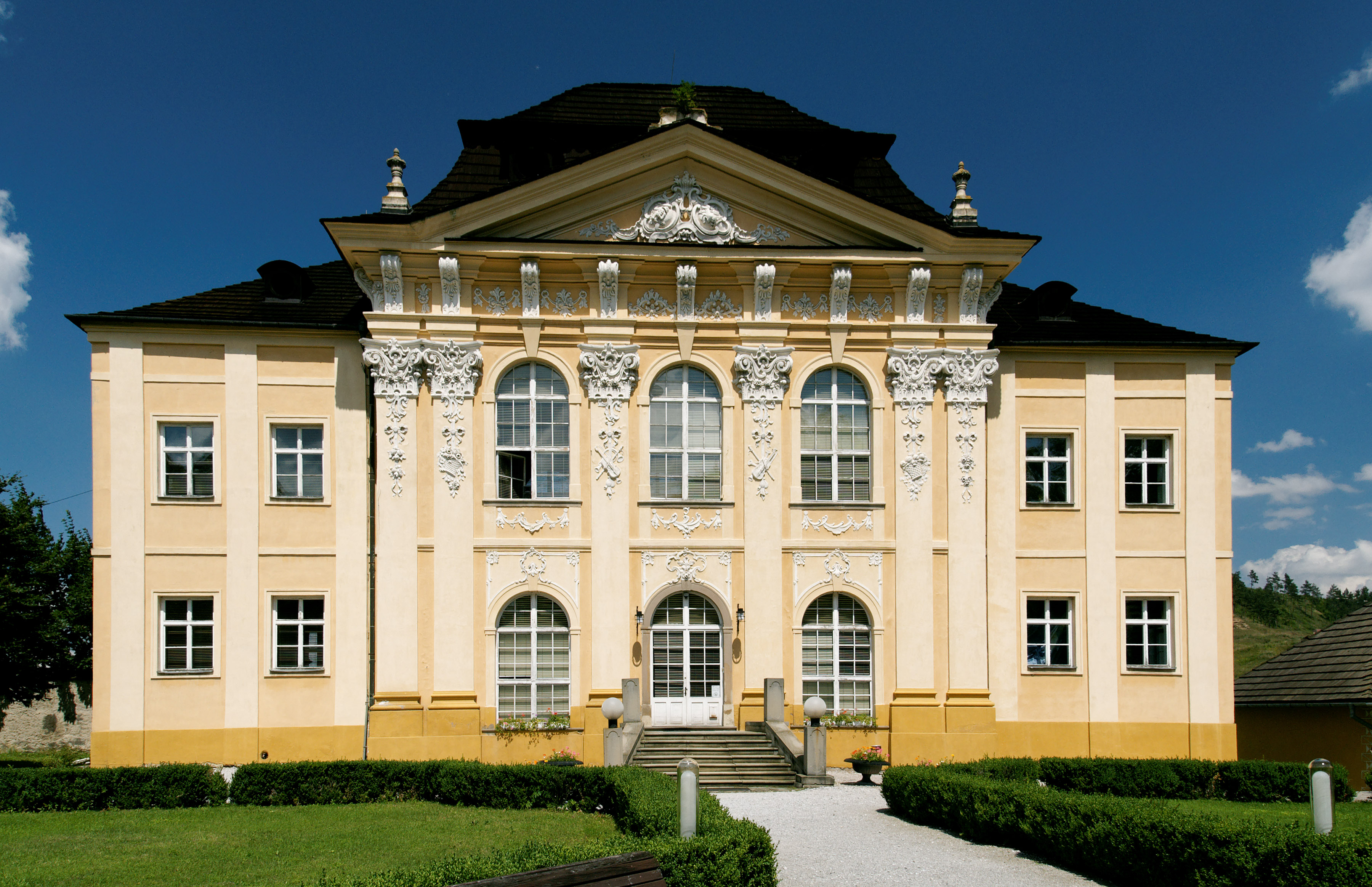 Letnia rezydencja Dardanely przy pałacu w Markušovcach